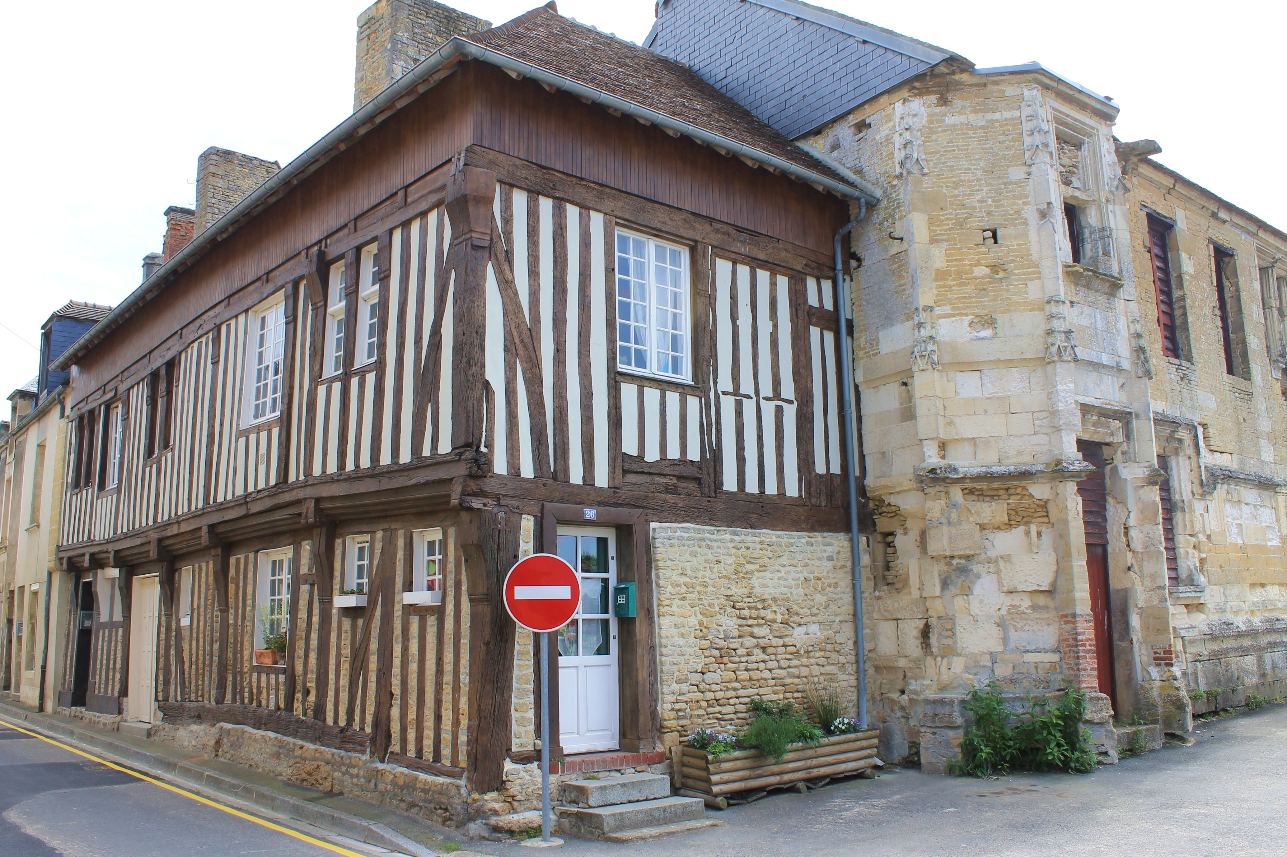 Maison à colombage du XVIe contiguë au manoir dit cour d'Elu à Saint-Pierre-sur-Dives (Calvados)